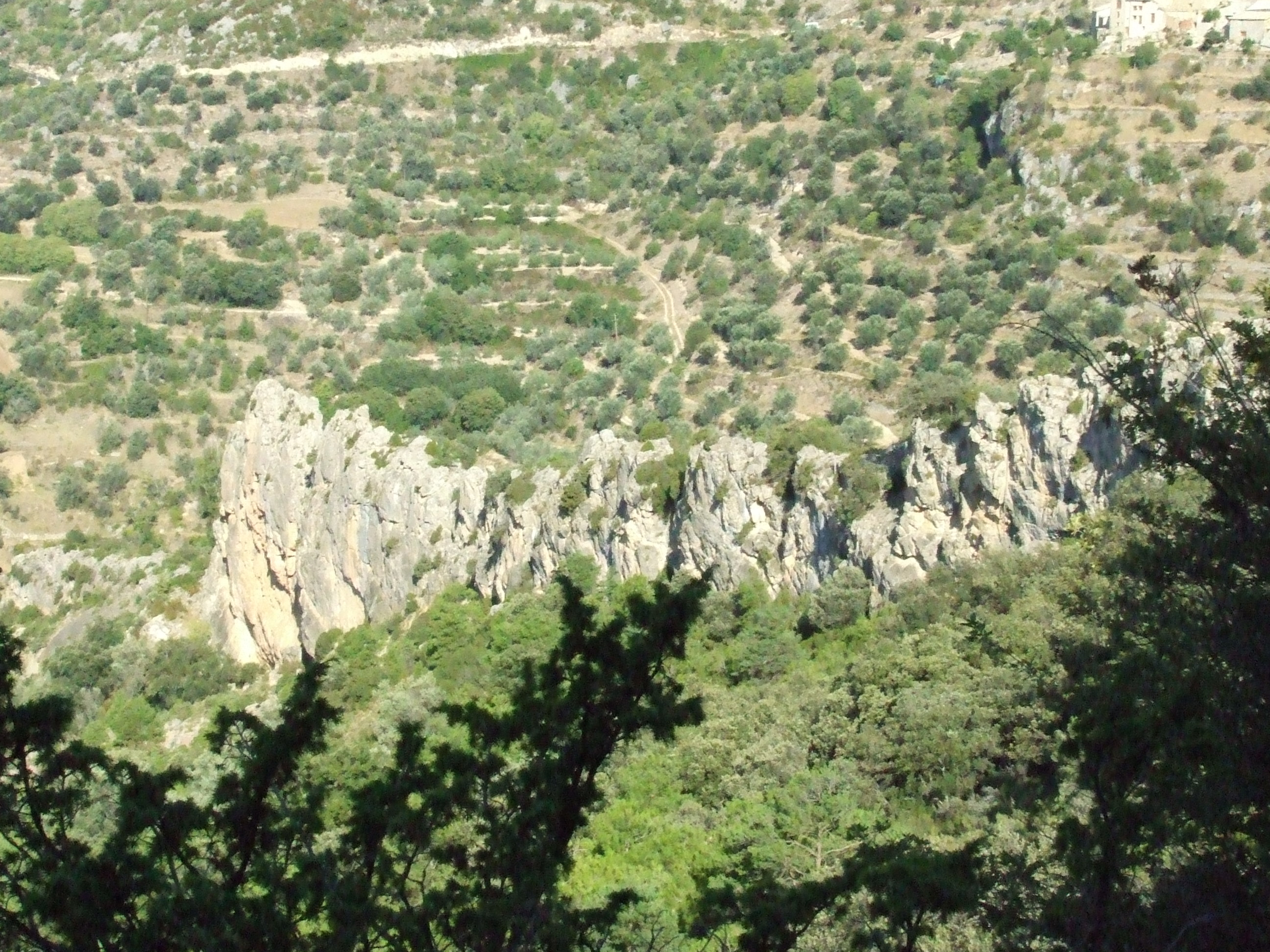 La Roca de Malimanya (Abella de la Conca, Pallars Jussà)